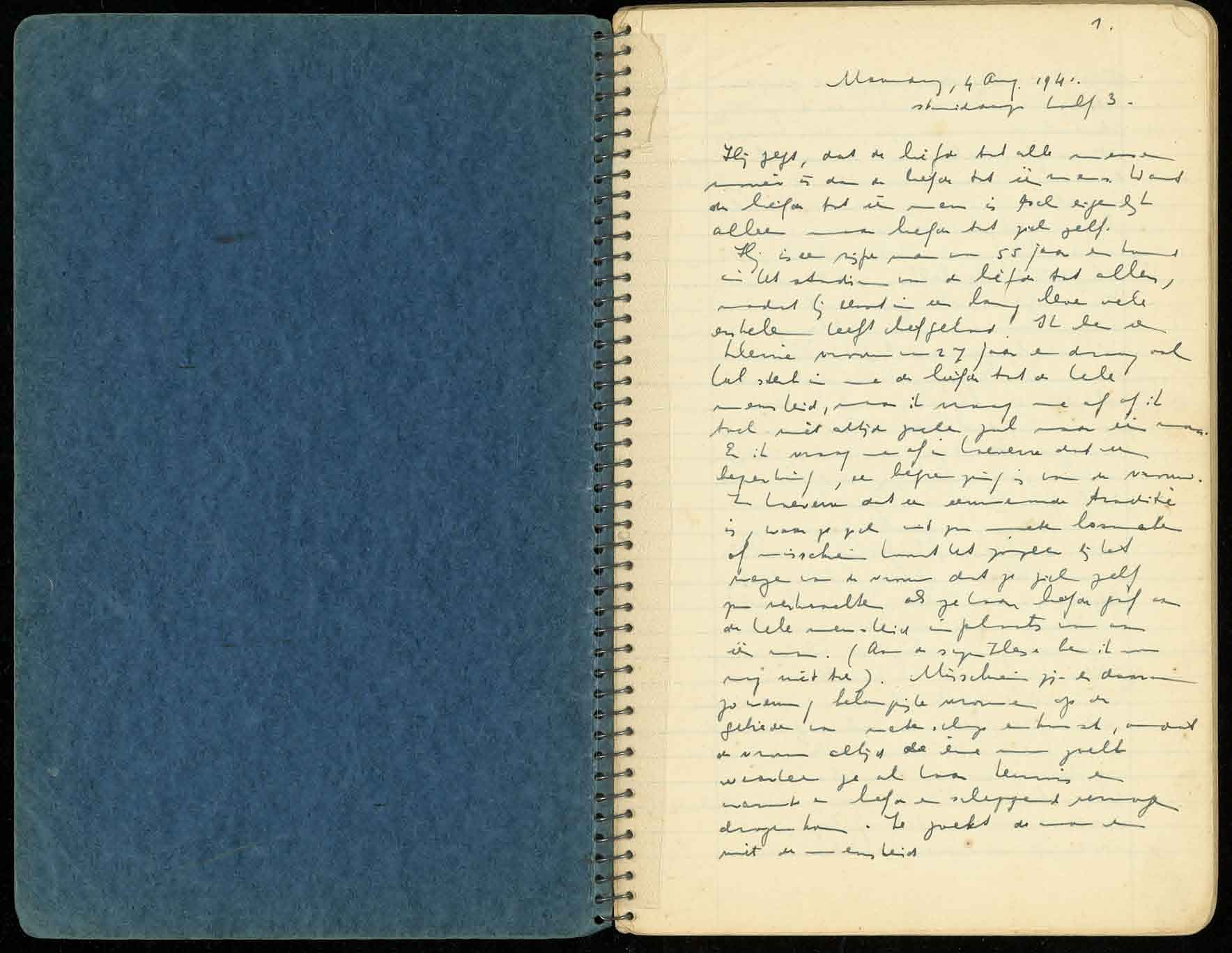 Dagboek Etty Hillesum, deel 1. Dagboek van Etty Hillesum in 11 delen (deel 7 bestaat niet).